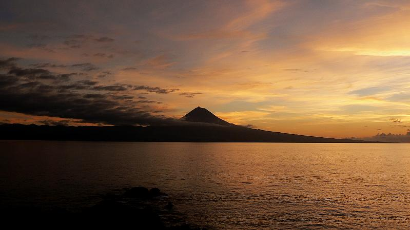 peregrino27-NEW VISION